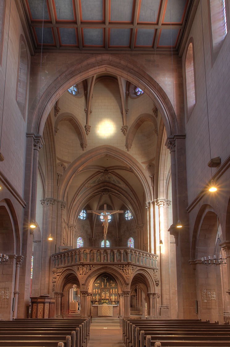 Mittelschiff der Marienkirche in Gelnhausen in Richtung des Chores mit dem davor liegenden Laienaltar unter dem Lettner.